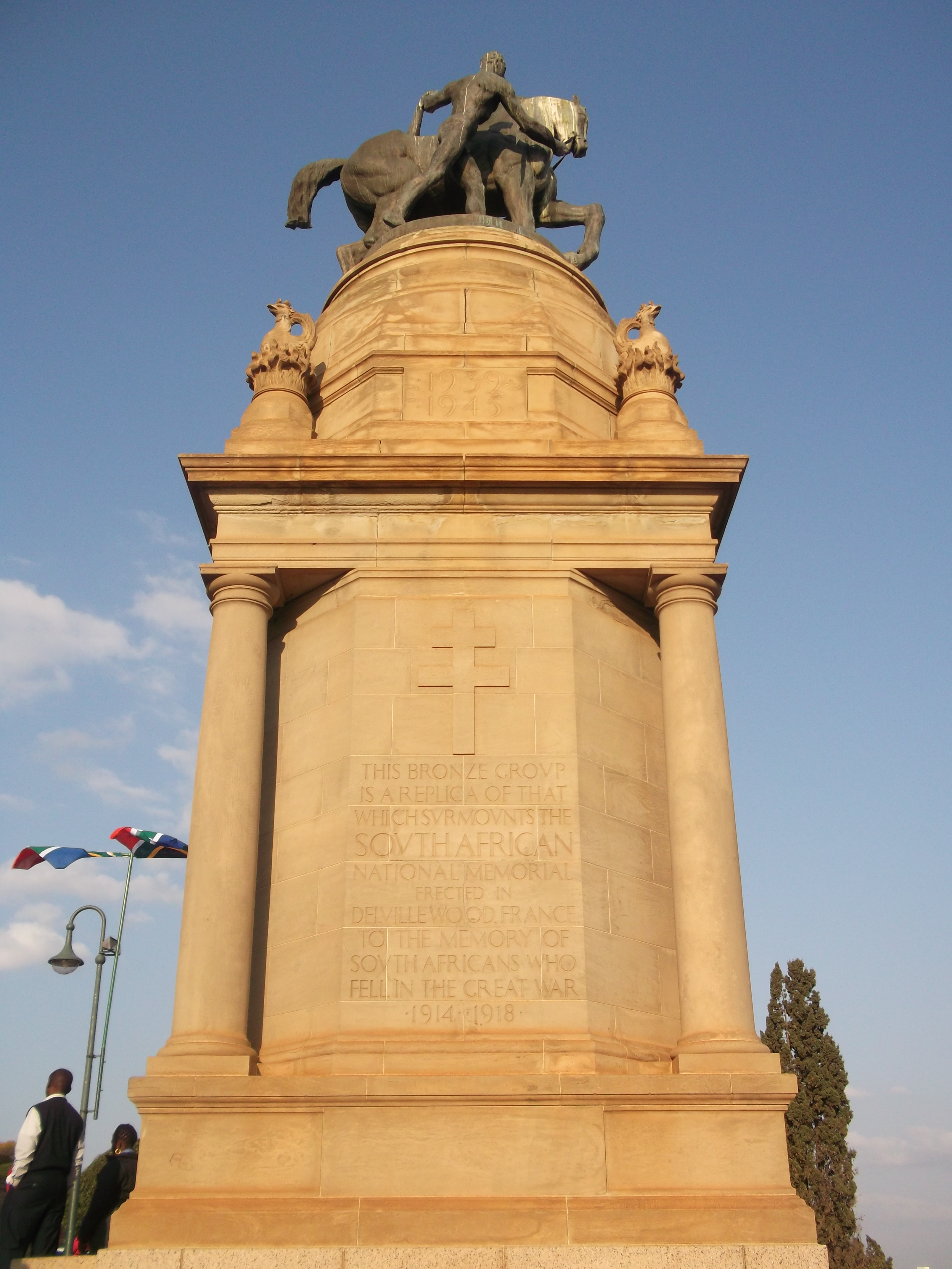 Mémorial du Bois Delville, à Pretoria.